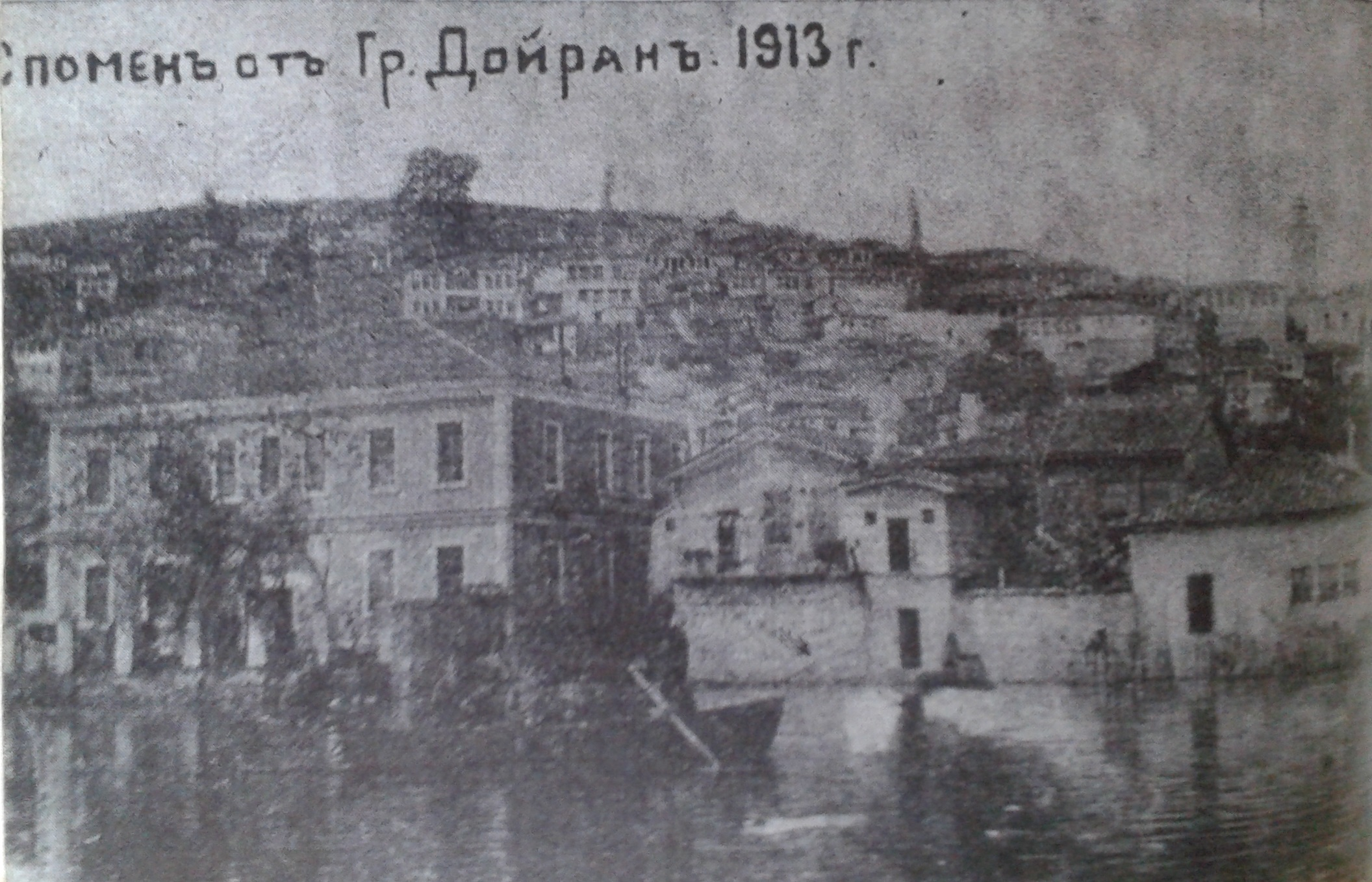 Дойран, 1913